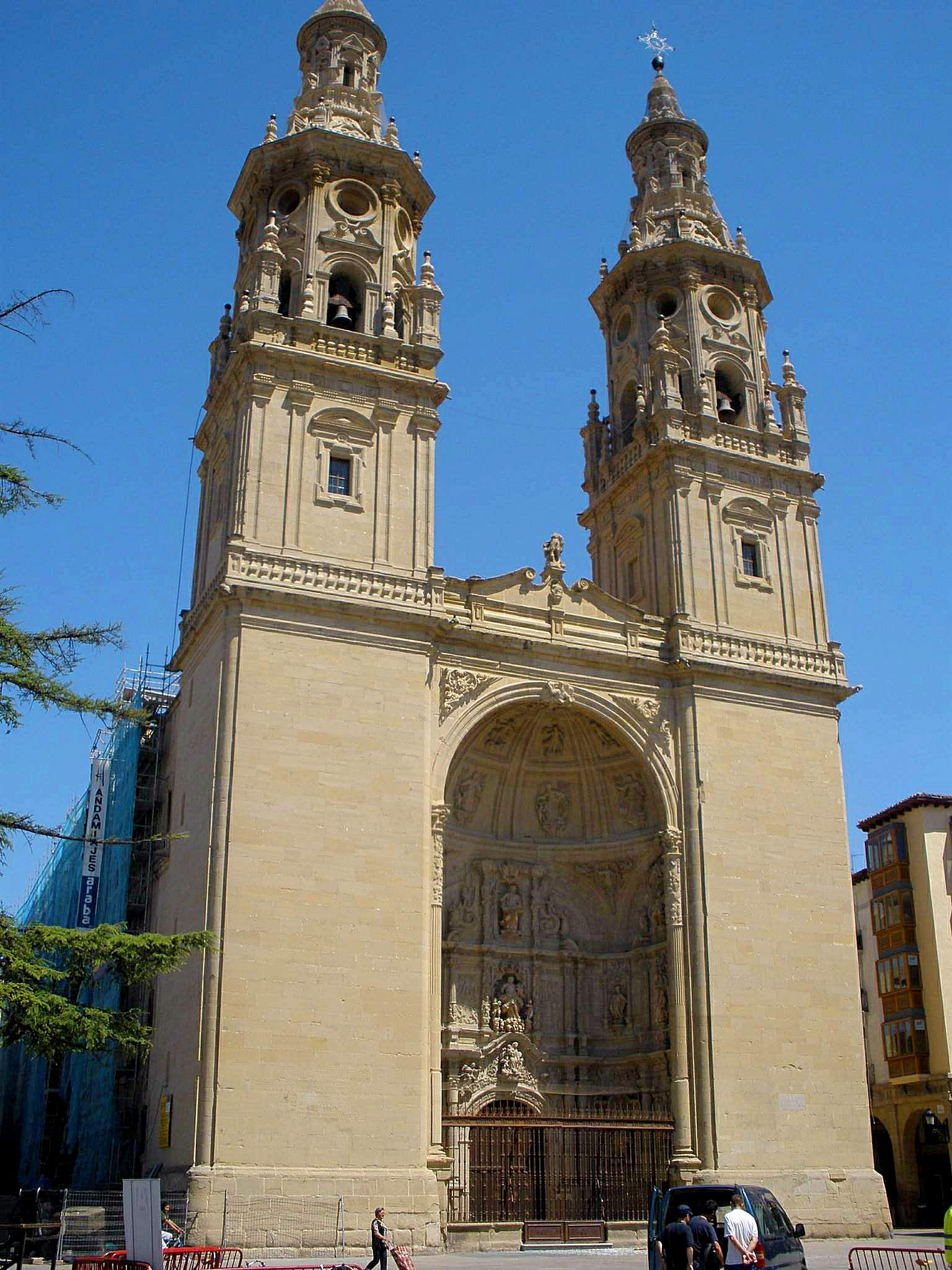 Catedral de Santa María la Redonda, Logroño (La Rioja)